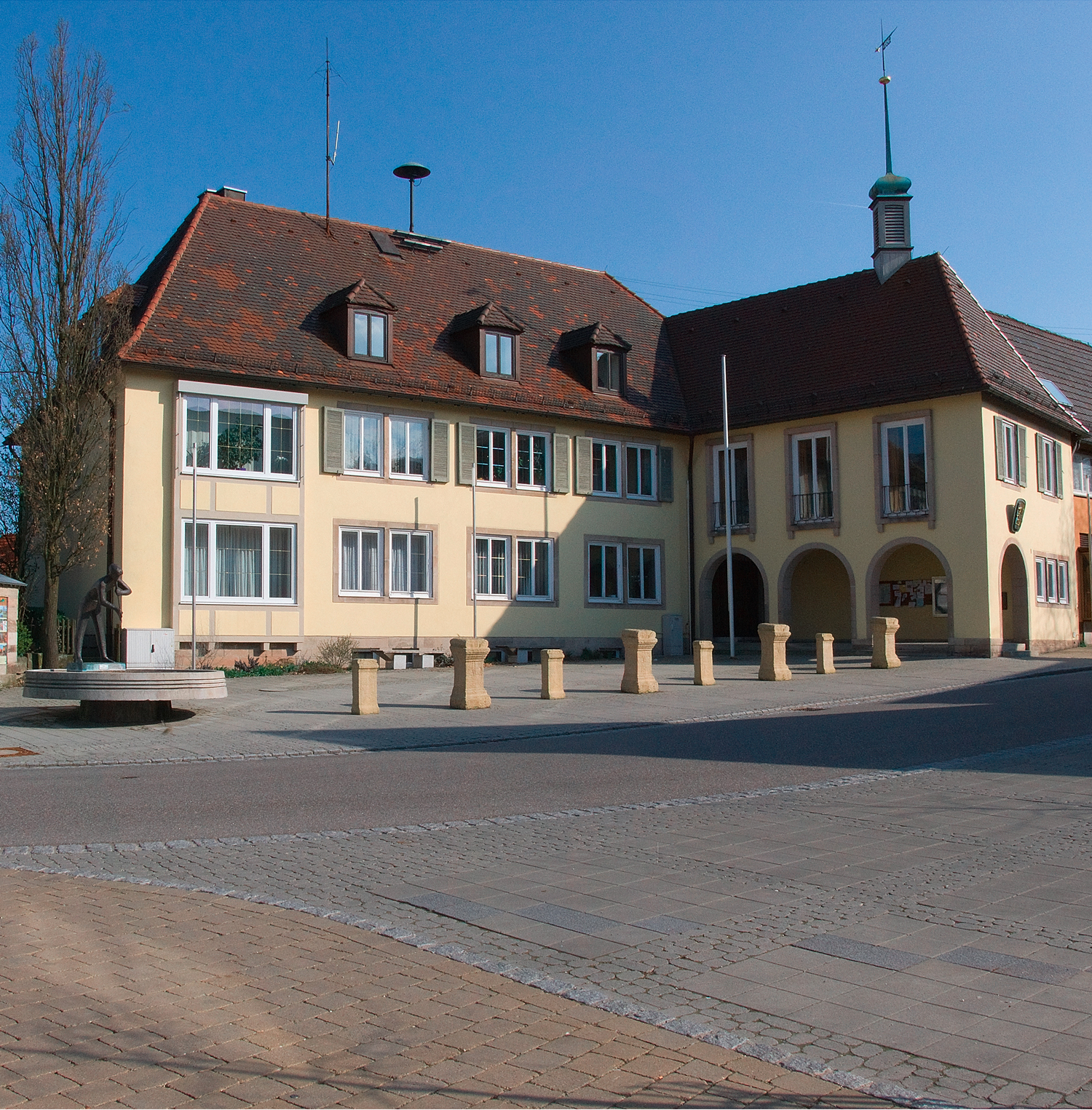 Rathaus der Gemeinde Mainhardt